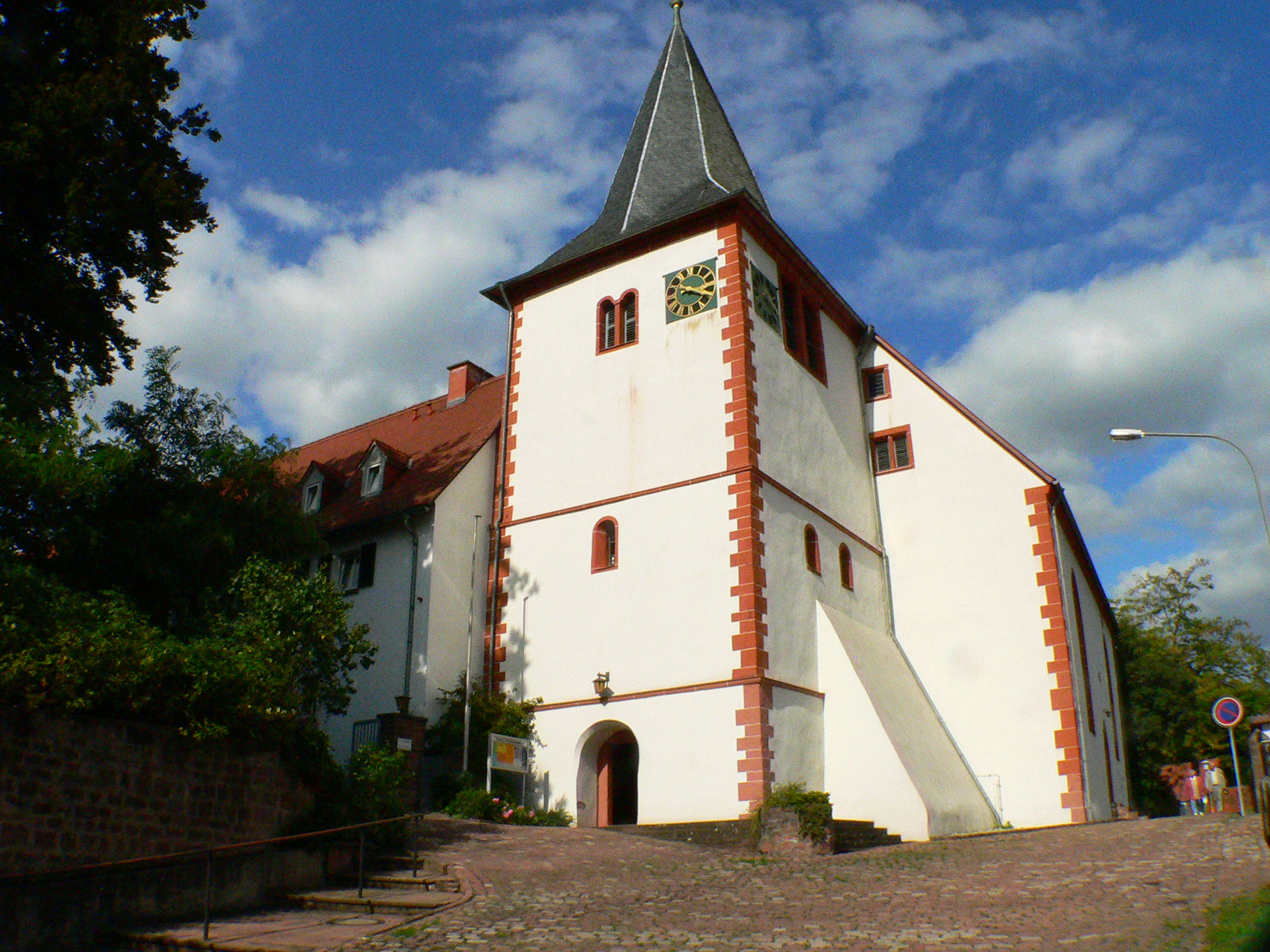 Höchst im Odenwald (Deutschland): Frühere Klosterkirche, heute Gemeindekirche. Turm um 1200, Schiff um 1570